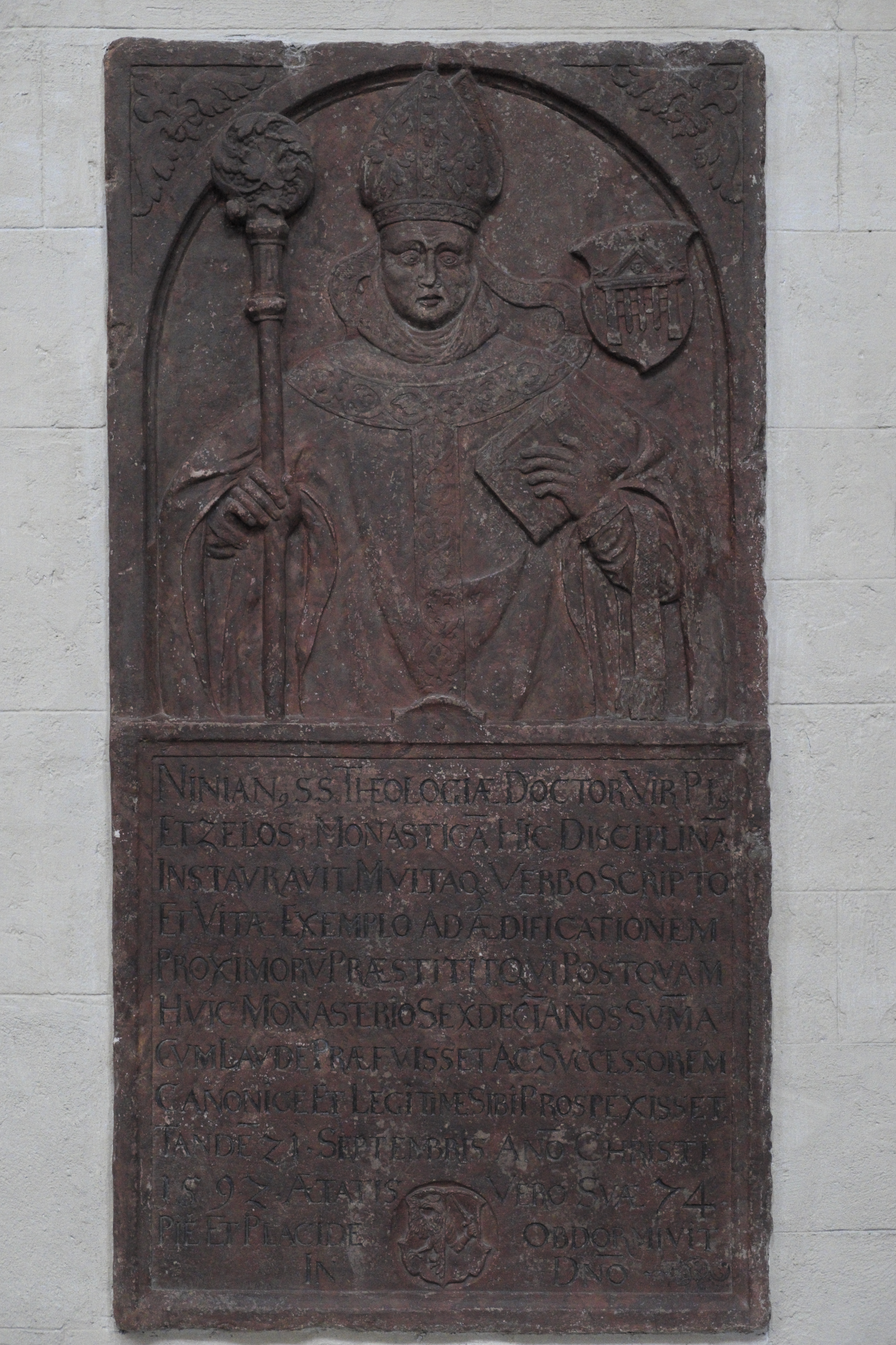 Ehemalige Klosterkirche St. Jakob des Schottenklosters St. Jakob in Regensburg (Oberpfalz/Bayern), Epitaph des Abtes Ninian Winzert († 1592)